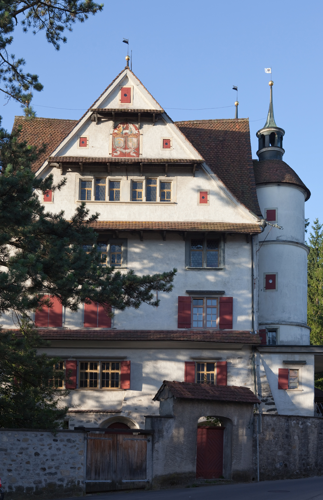 Das Schloss in Appenzell. Blick aus Norden zum Eingang an der Poststrasse.